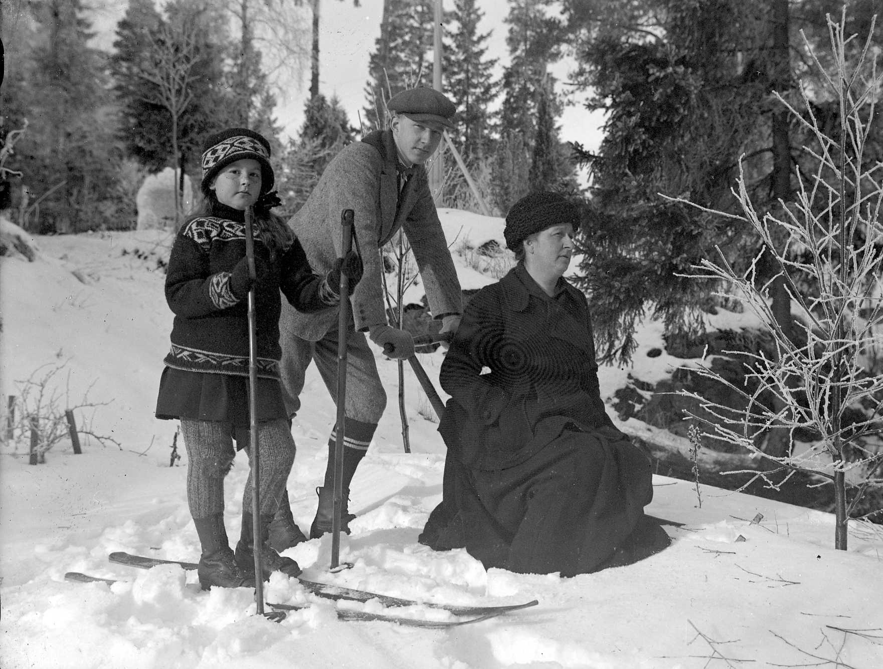 Vinterbild. Gruppfoto av en kvinna som sitter på en sparkstötting och en pojke och en flicka på skidor.